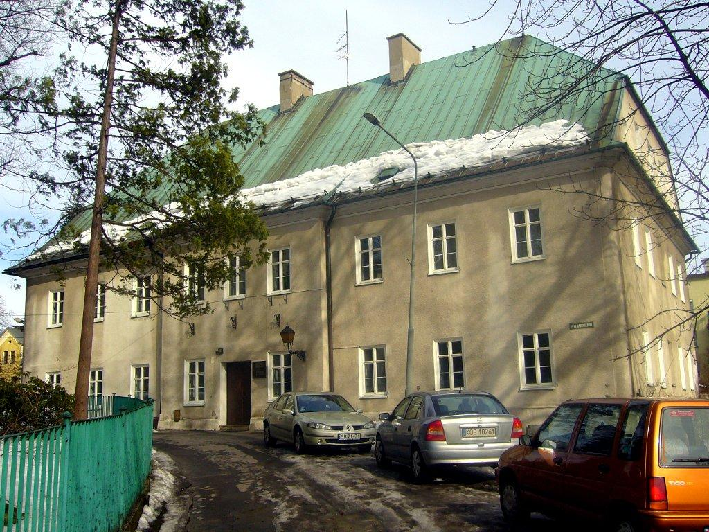 Plebania kościoła Zbawiciela w lutym 2010.